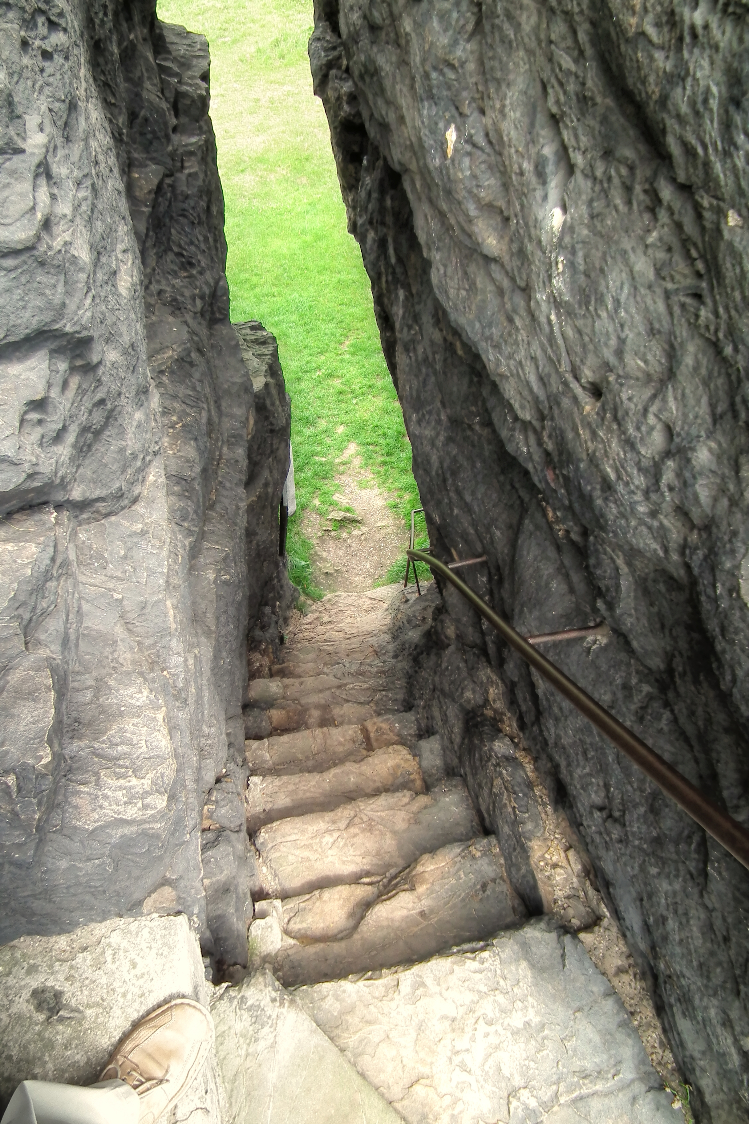 Gegensteine